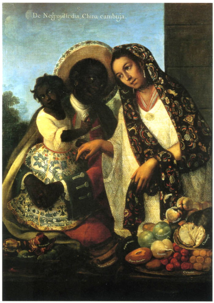 Pintura de Castas, 9. De negro e india – China cambuja.